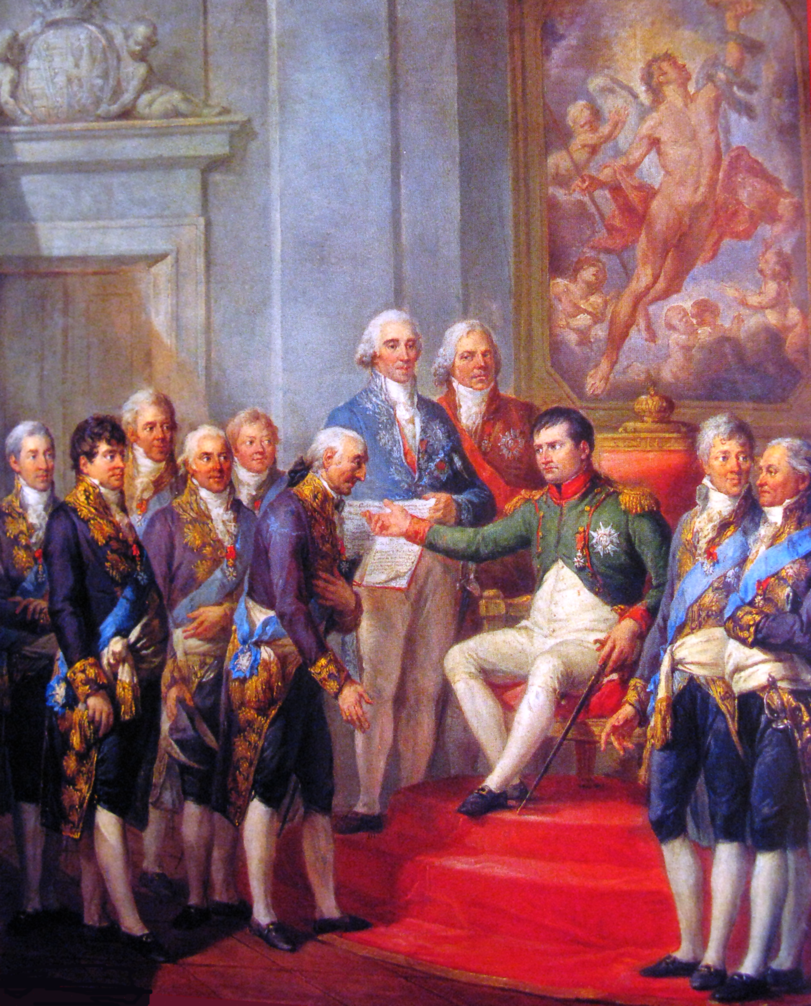 Portrait of Napoleon, Talleyrand, Hugues-Bernard Maret duc de Bassano, Stanisław Małachowski, Ludwik Szymon Gutakowski, Stanisław Kostka Potocki, Józef Wybicki, Ksawery Działyński, Paweł Bieliński, Władysław Sobolewski, Juliusz Łuszczewski.